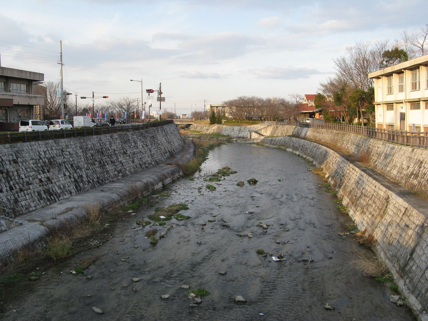 葛城川 御所市役所付近を北流 まなび橋から北望